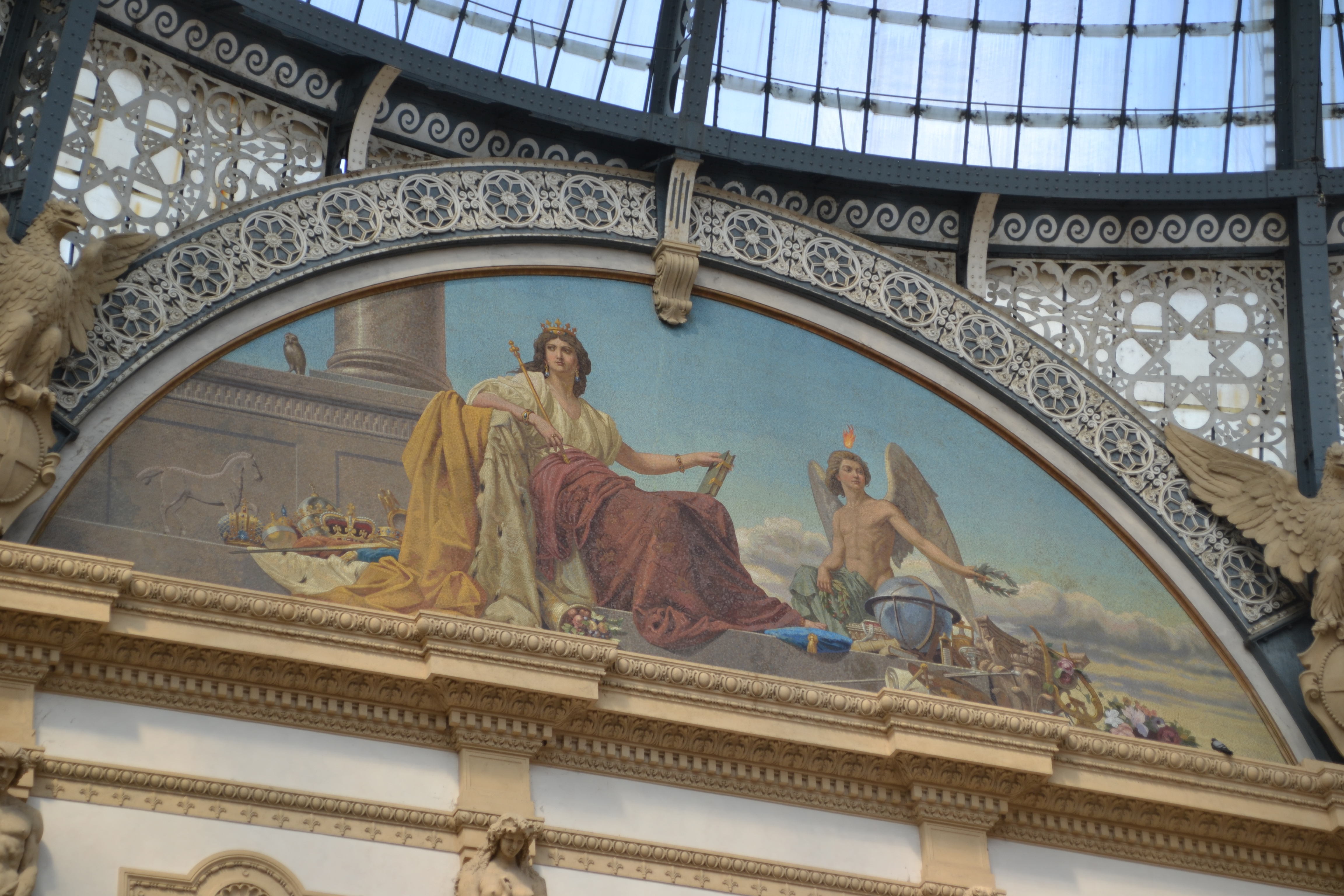 Lunetta Europa - Galleria Vittorio Emauele II - Milano This is a photo of a monument which is part of cultural heritage of Italy.